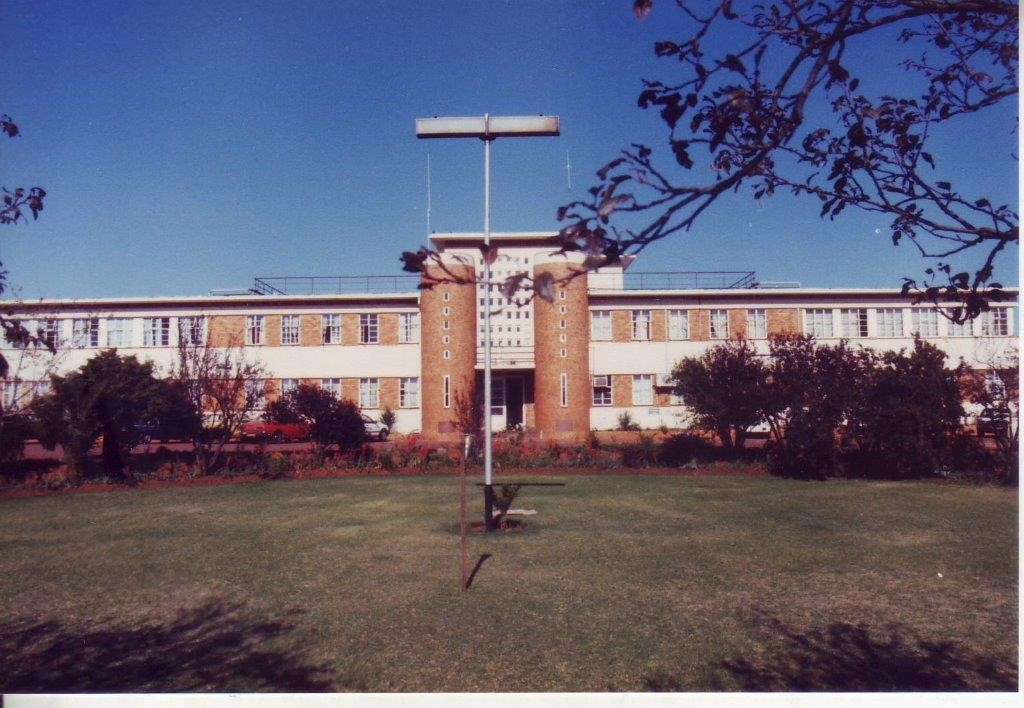 'n Onlangse foto van die Moerdyk-hospitaal